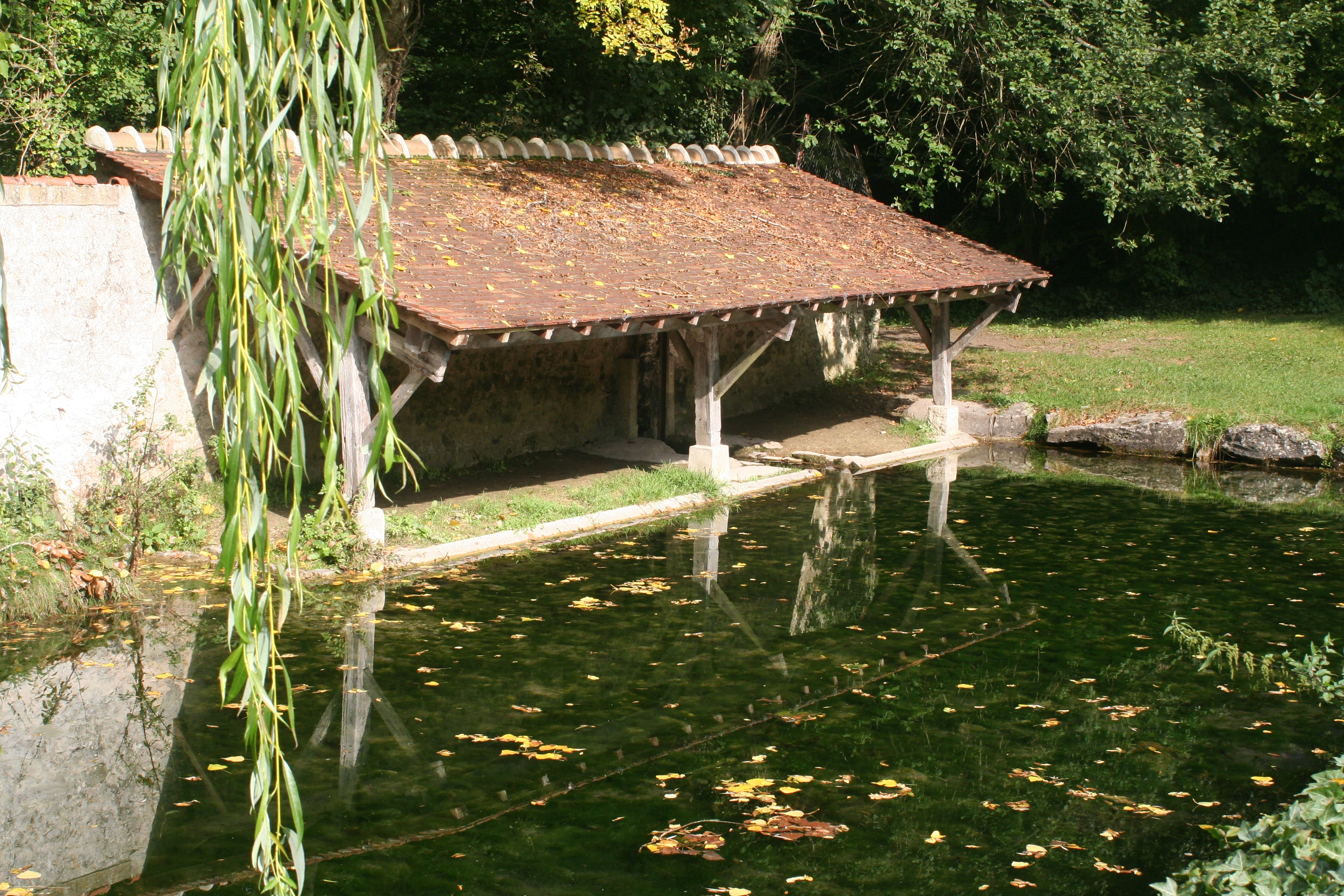 Le lavoir